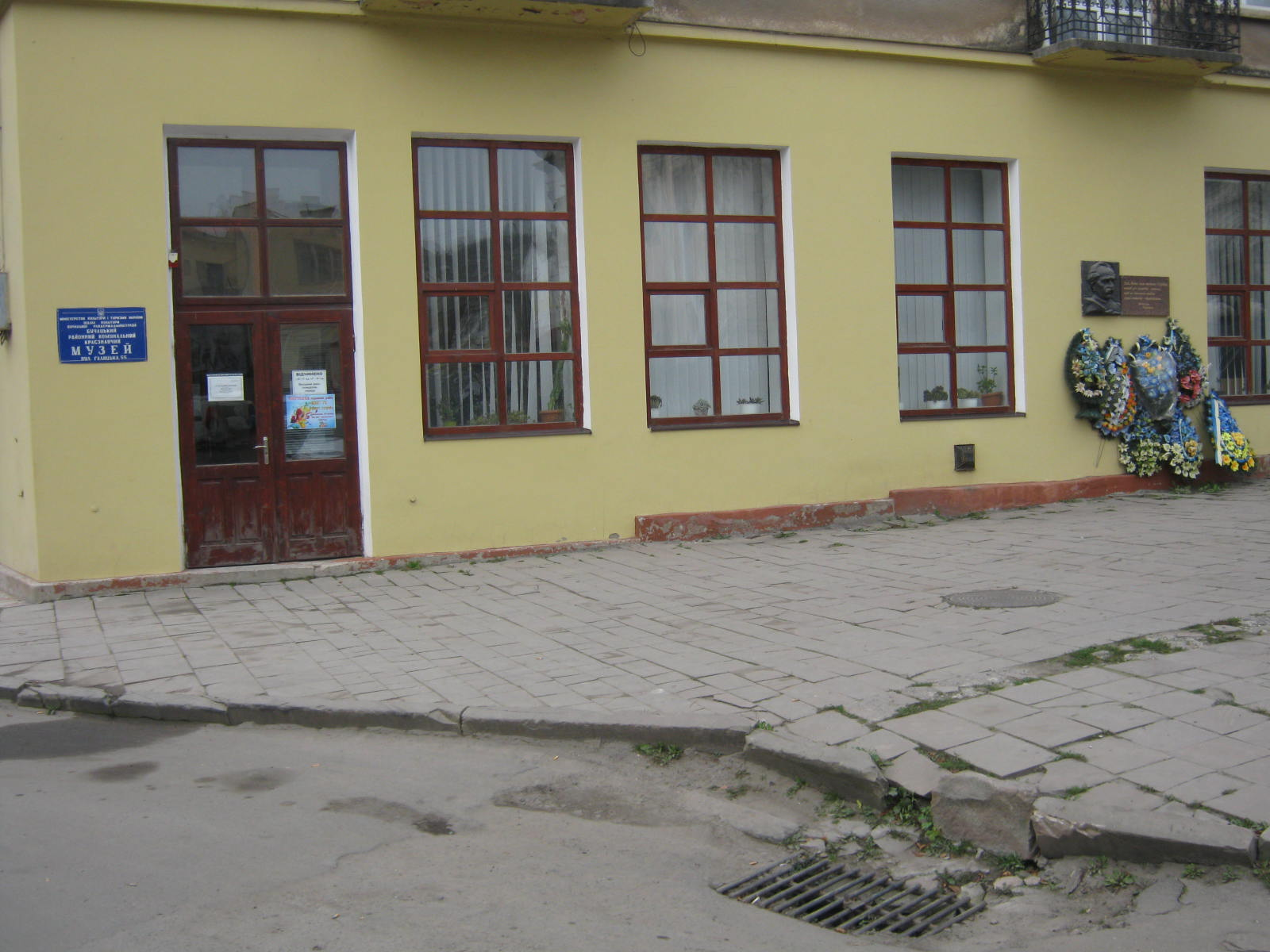 Бучацький районний краєзнавчий музей. Жовтень 2013